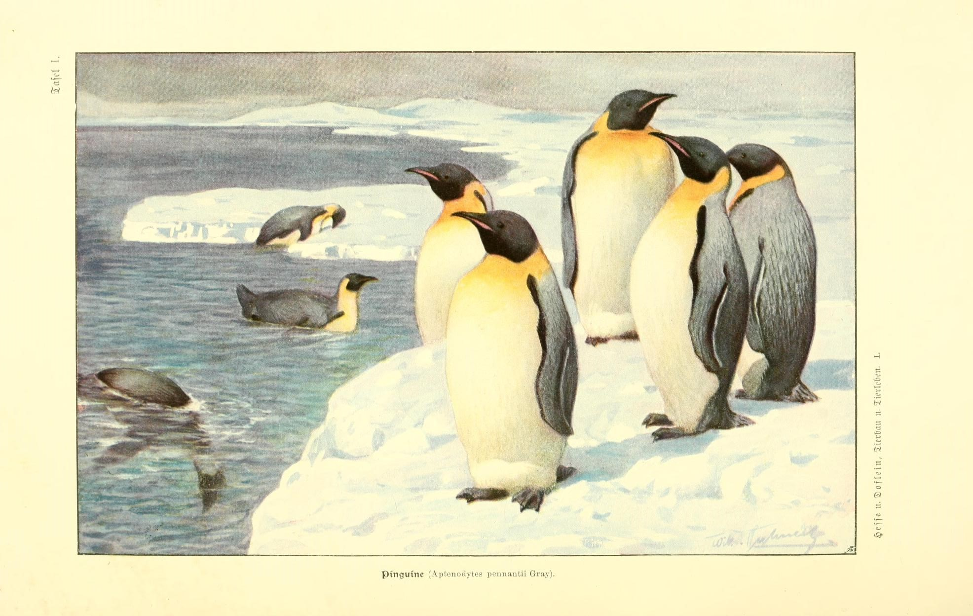 Tafel I Pinguine. 'Sofleiii, licrdau u. lievIeOcn. I.